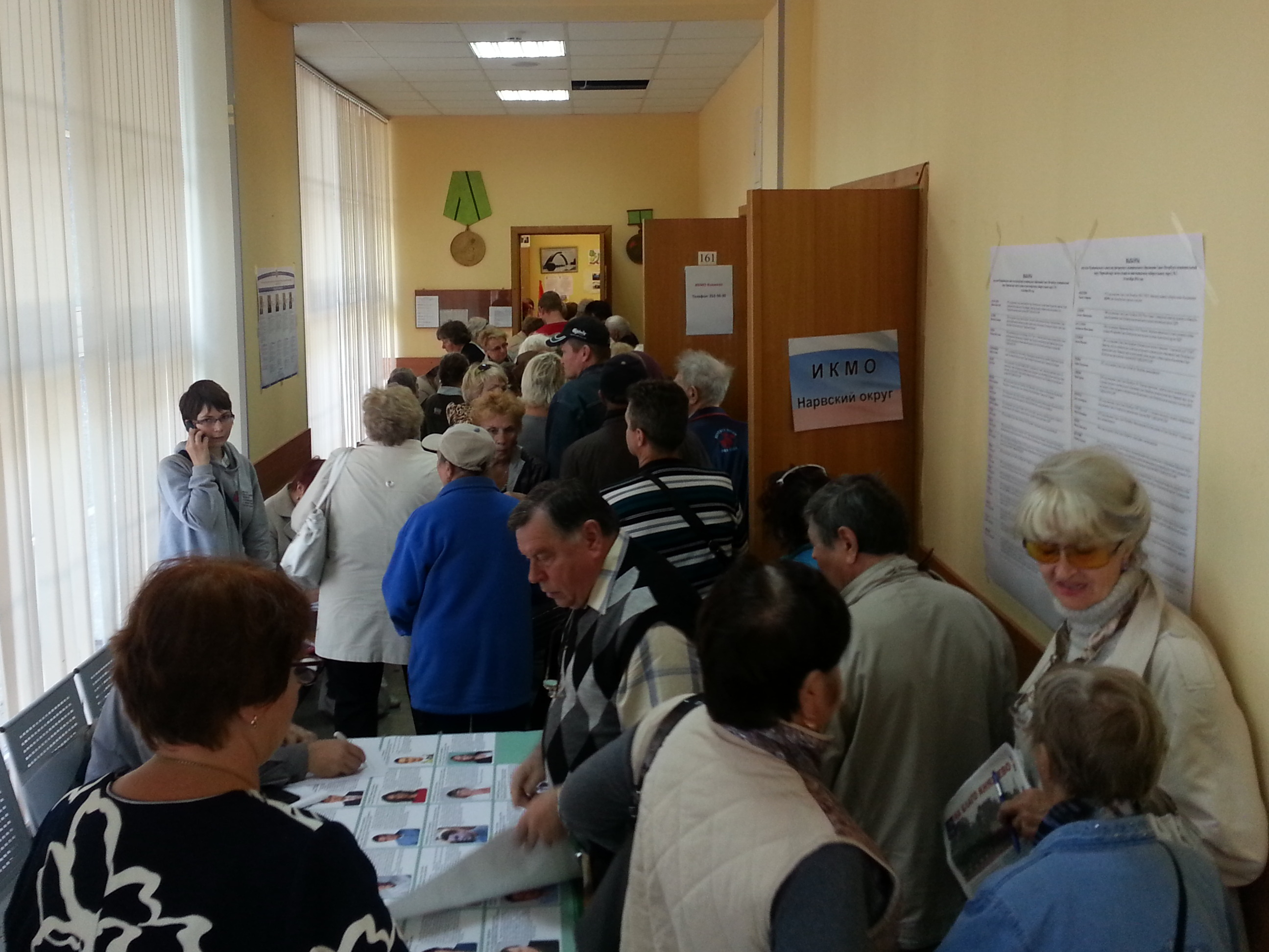 Большая группа избирателей, привезённая на автобусе в ИКМО МО Княжево, не умещается в помещении для голосования на муниципальных выборах в Санкт-Петербурге 2014 года